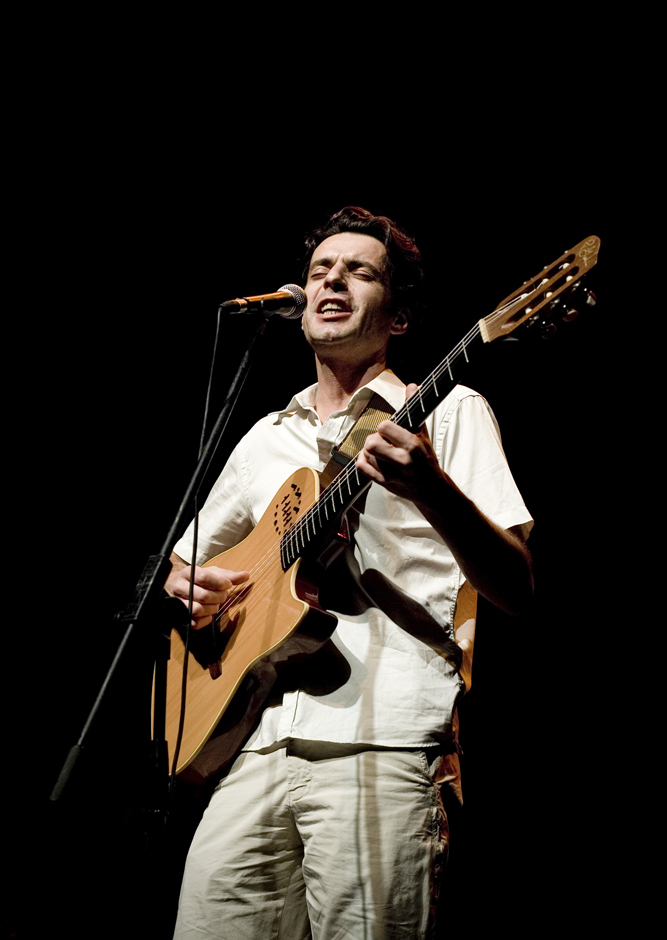 JP Simões